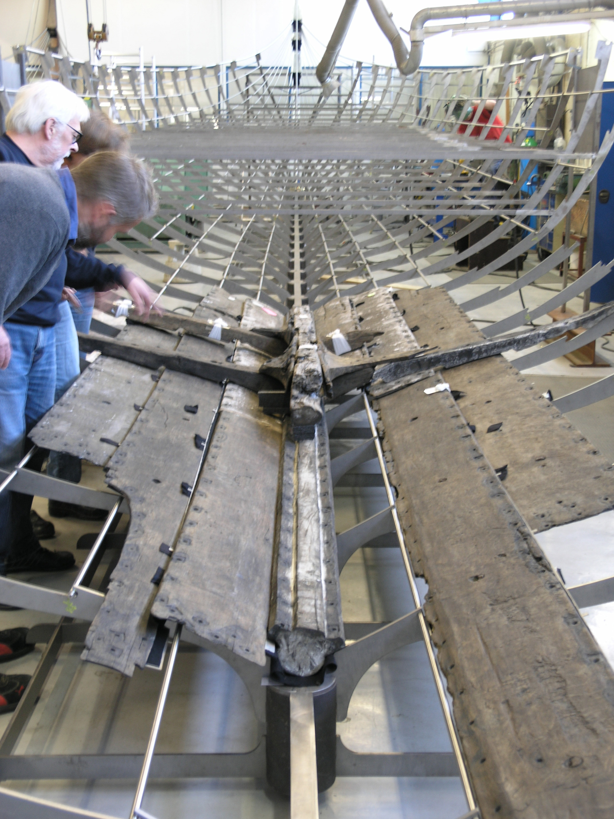 Skibet udstilles i VIKING på Nationalmuseet 22/6-17/11 2013 Foto: Nationalmuseet.